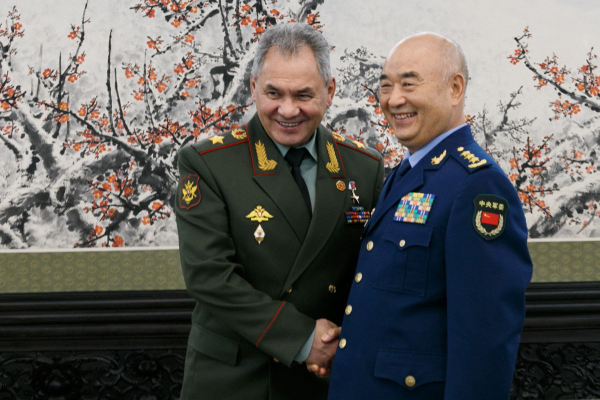 Dстреча Министра обороны России генерала армии Сергея Шойгу и заместителя председателя Центрального военного совета Китайской Народной Республики генерал-полковника Сюй Циляна